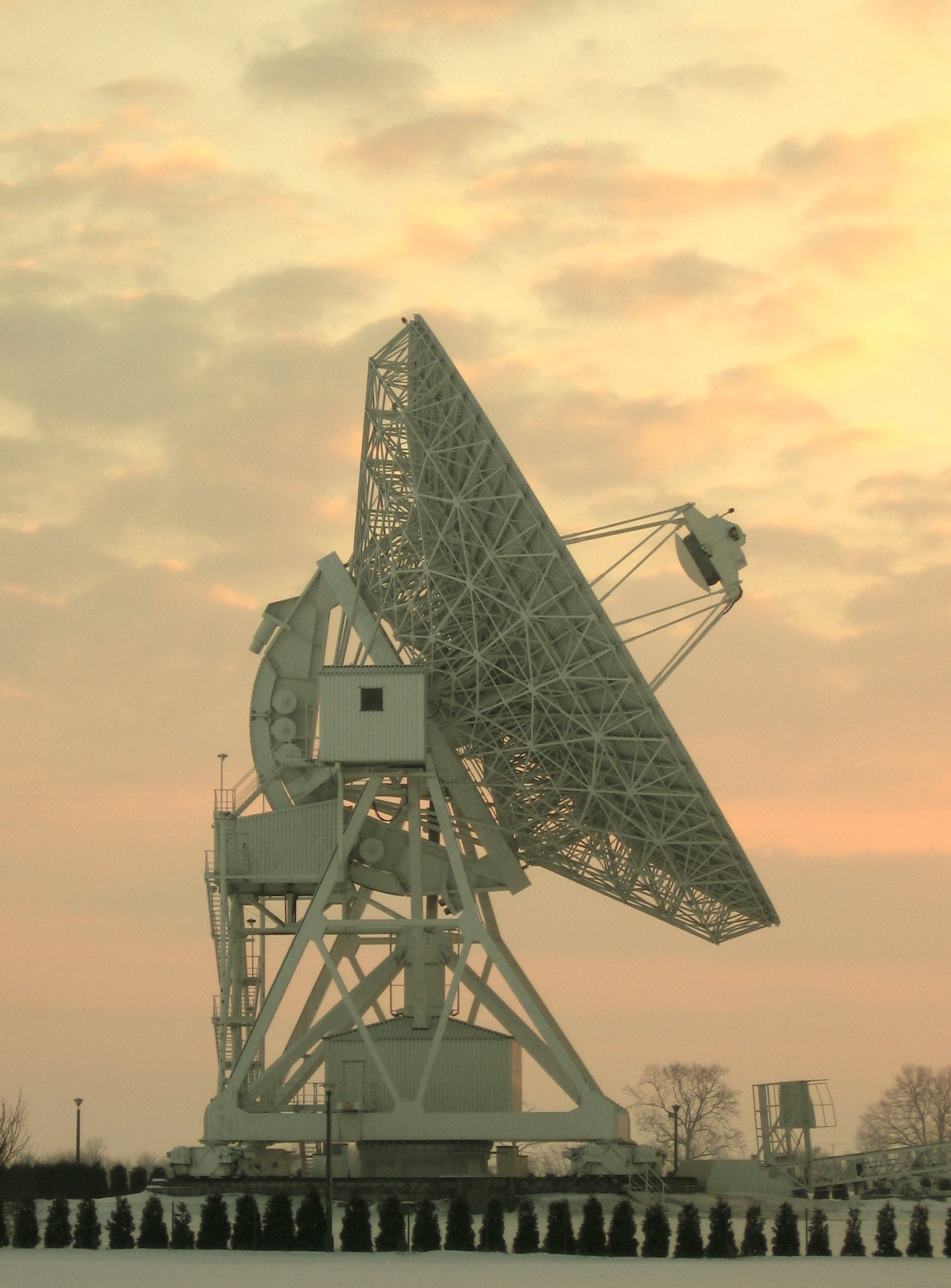 Torun 32m radiotelescope at sun rise; author: Roman Feiler.